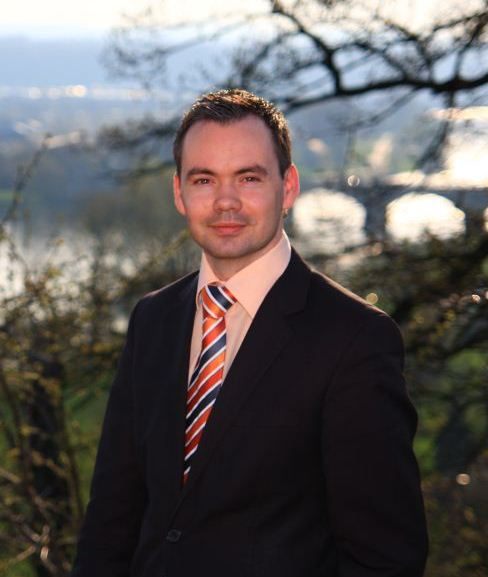 Norbert Bläsner; im Hintergrund die Stadtbrücke der Kreisstadt Pirna